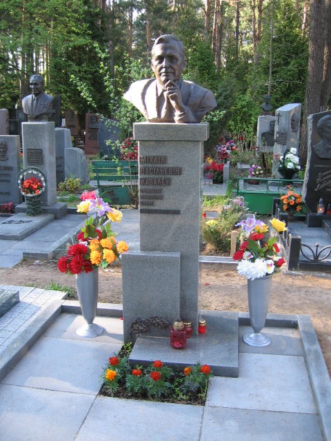 Могила Михаила Васильевича Ковалёва (1925-2007) - Первый заместитель Председателя Совета Министров БССР